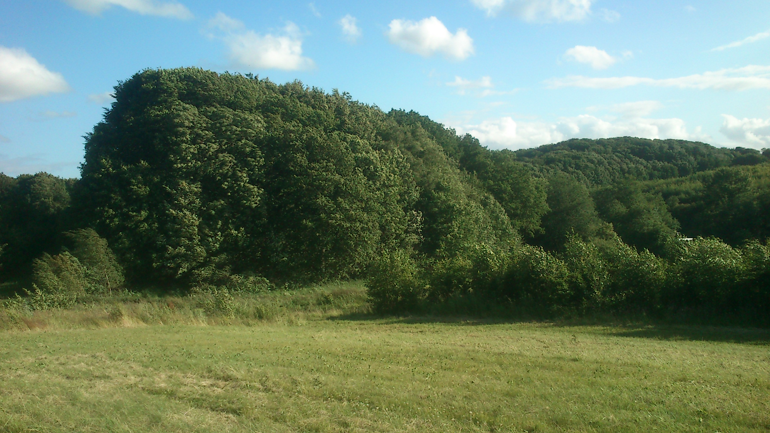 Årslev Skov. Set fra Laskedalen i nord.